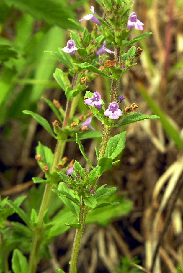 Pievinė žvirgždė (Acinos arvensis) Šeima. Notreliniai (Lamiaceae) Foto: Algirdas, 2006 m. birželio 26 d., Lietuva.